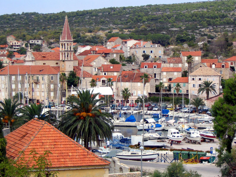 Milna, Brač, Hrvatska - pogled na marinu s juga